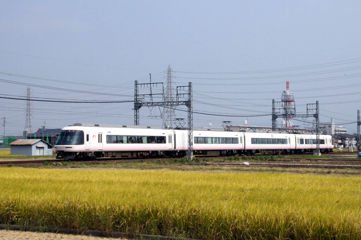 26000系さくらライナー（リニューアル車）